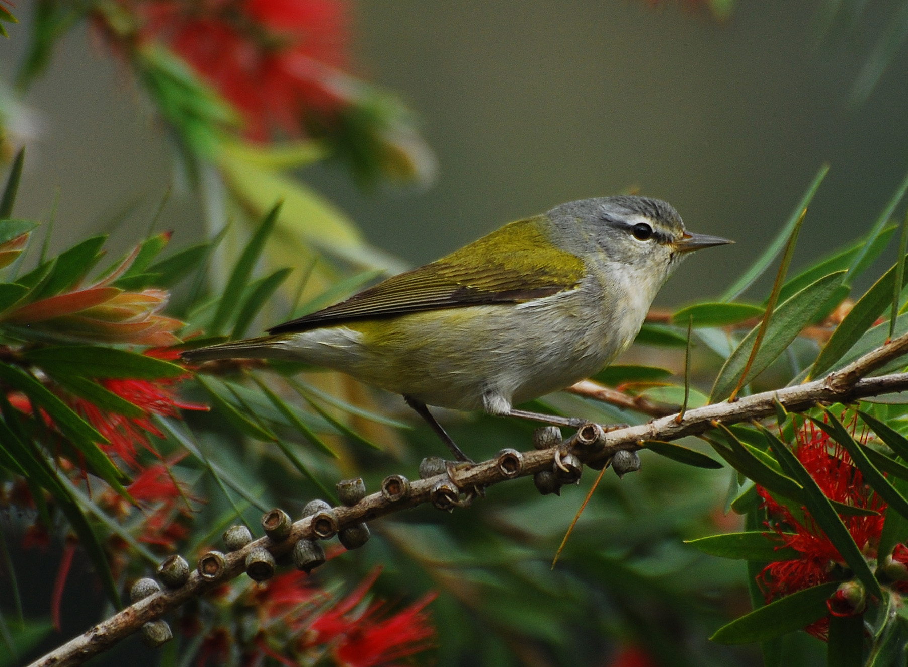 Tennessee Warbler (Vermivora peregrina) at Savegre Lodge, Costa Rica, 080226.